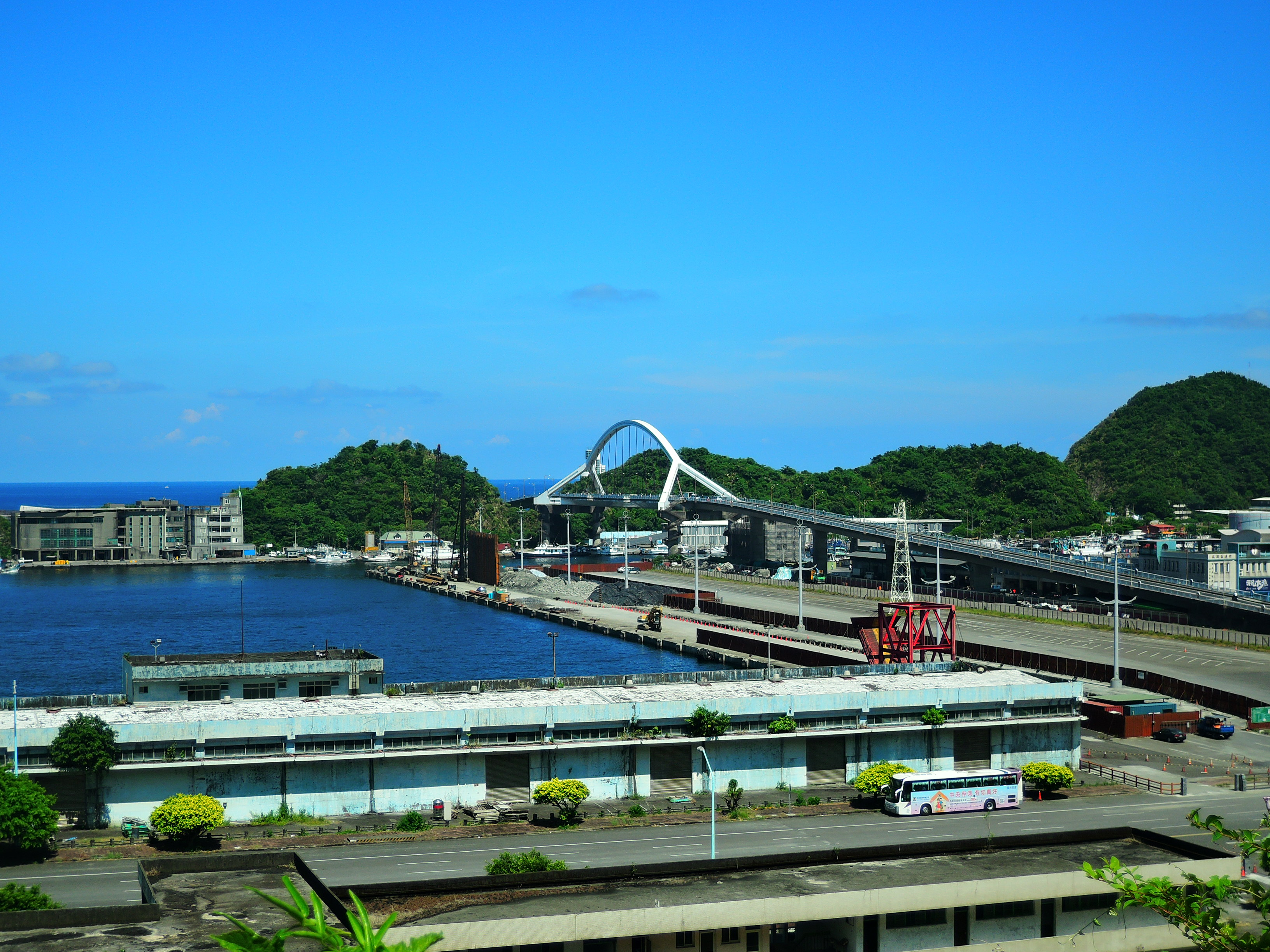 蘇澳鎮南方澳漁港